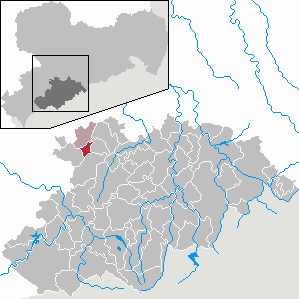 Niederwürschnitz im Erzgebirgskreis, Sachsen